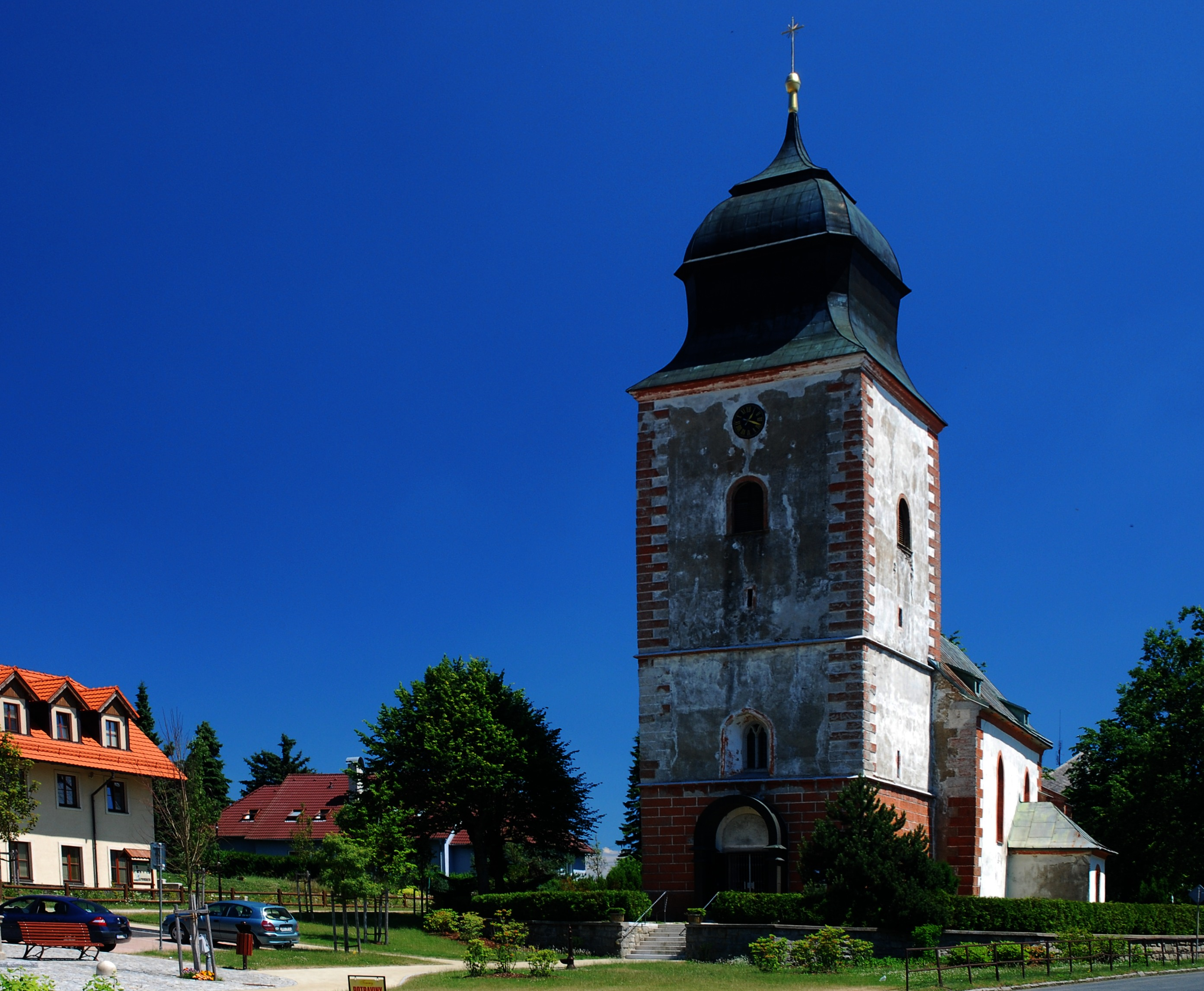 Přimda - kostel sv.Jiří